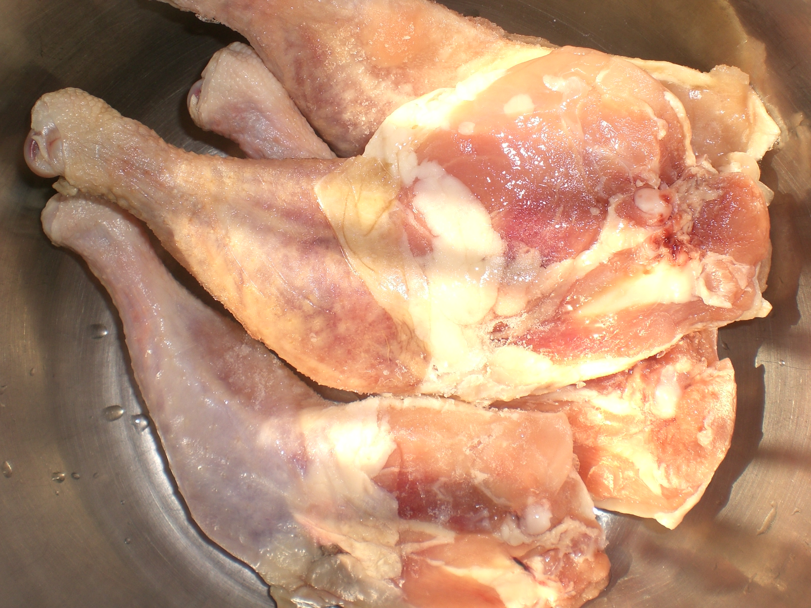 雞腿 腿